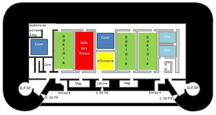 Abri du Gros Bois plan étage 1